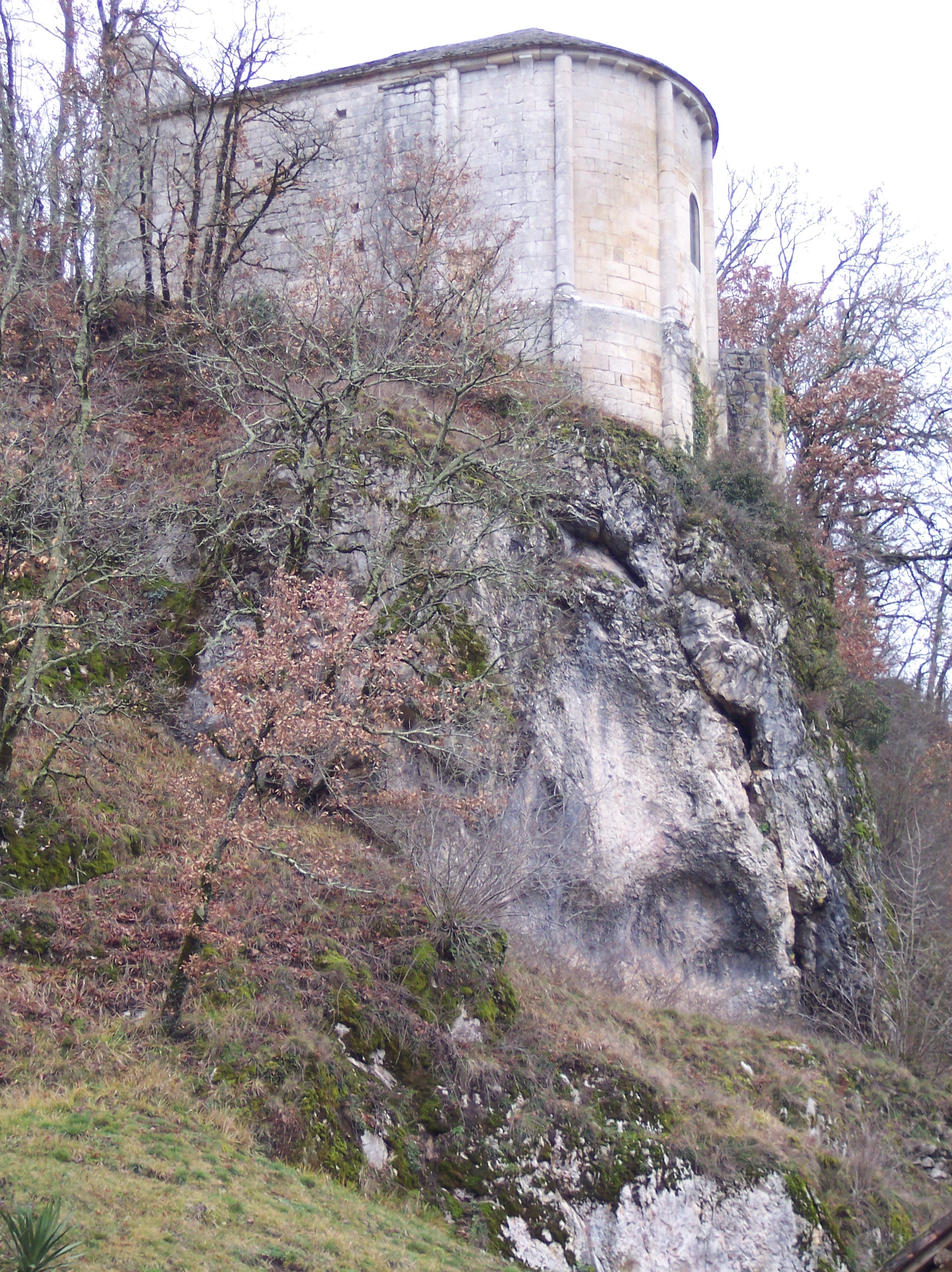 La chapelle Saint-Michel d'Auberoche vue du sud-est, Le Change, Dordogne, France. Photo personnelle.